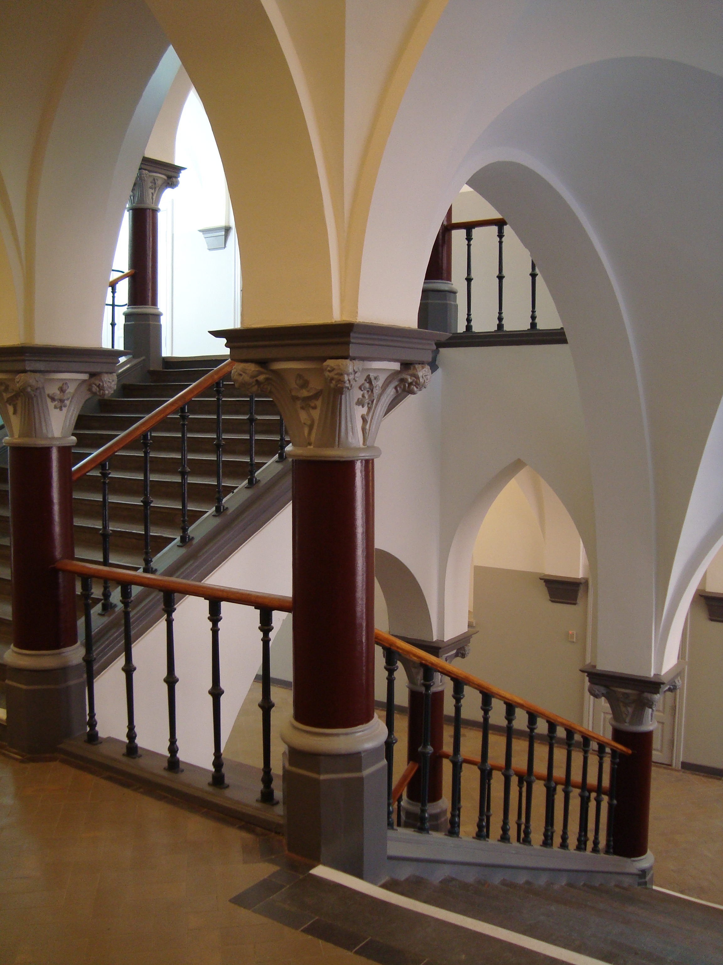 Trapphallen i gamla Gossläroverket i Helsingborg.